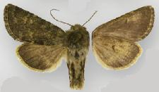 Lasionycta silacea male